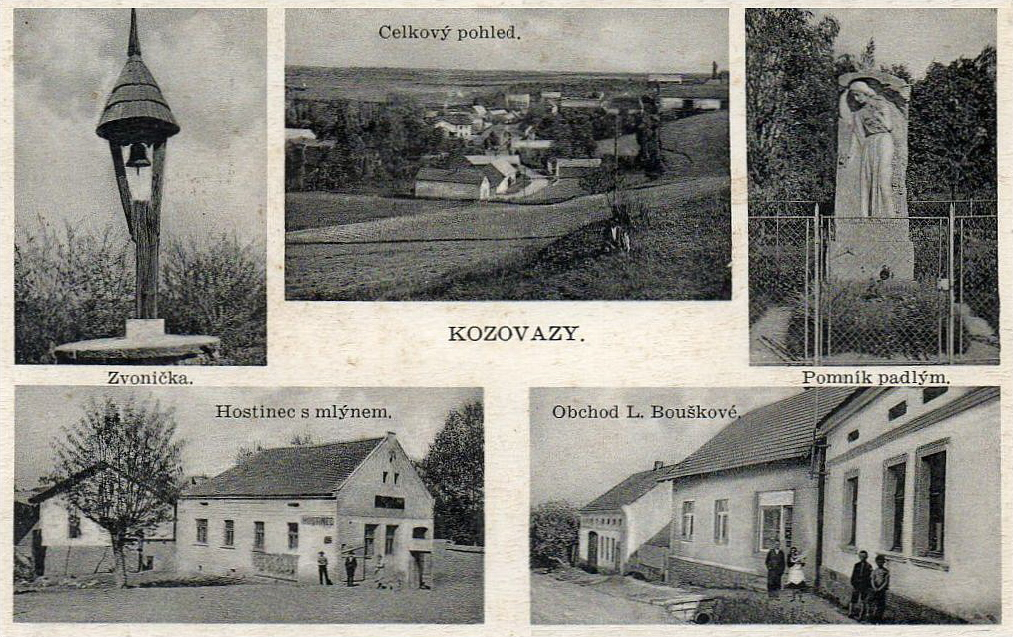 Kozovazy, dobová pohlednice, před 1930. Zvonička, celkový pohled, hostinec s mlýnem, obchod L. Bouškové.